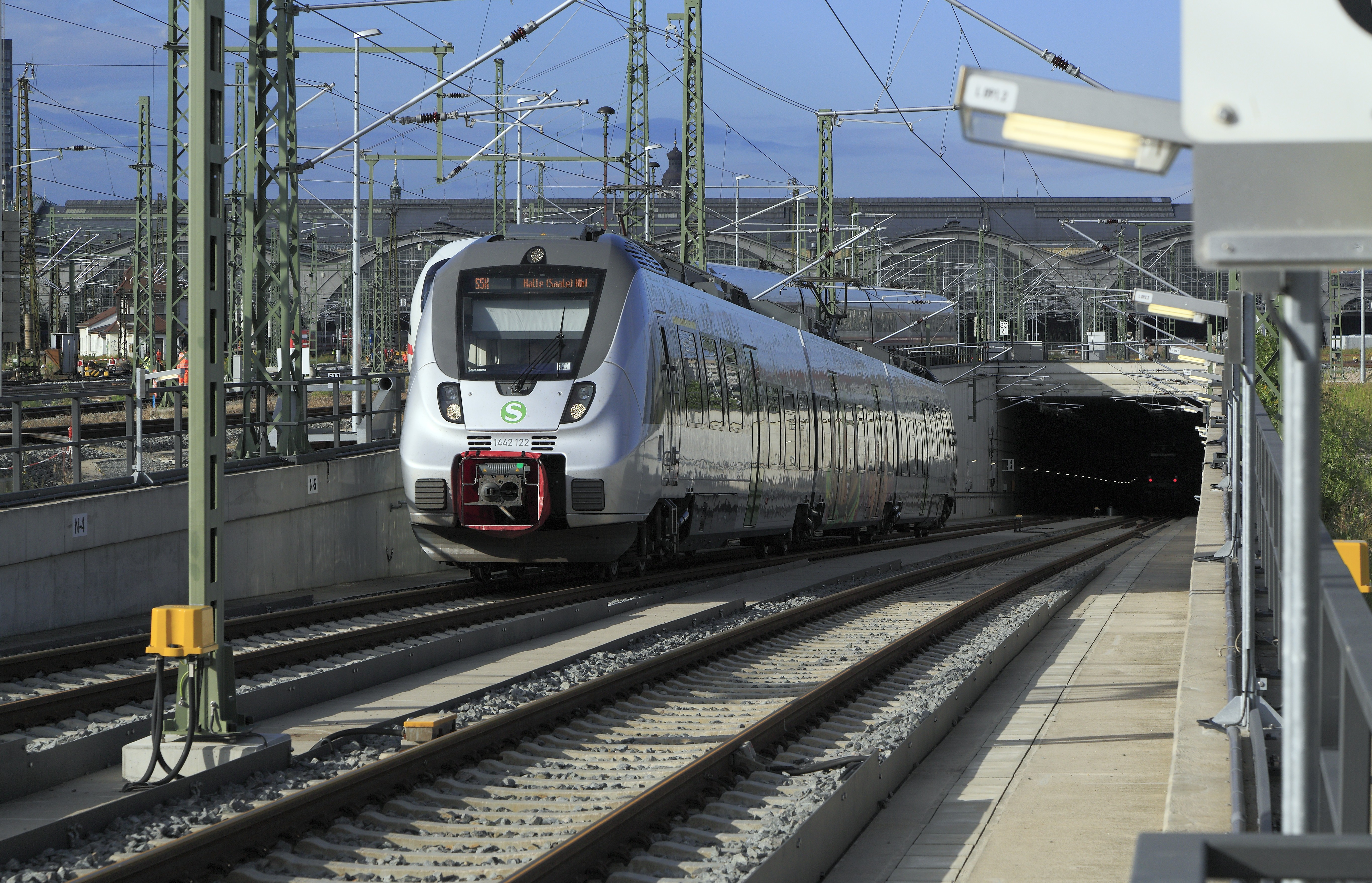 Ein Zug der Linie S5X von Zwickau (Sachs) nach Halle (S) Hbf verlässt den Stadttunnel in Richtung Norden. Im Hintergrund die Bahnsteighallen des Bahnhofs Leipzig Hbf.